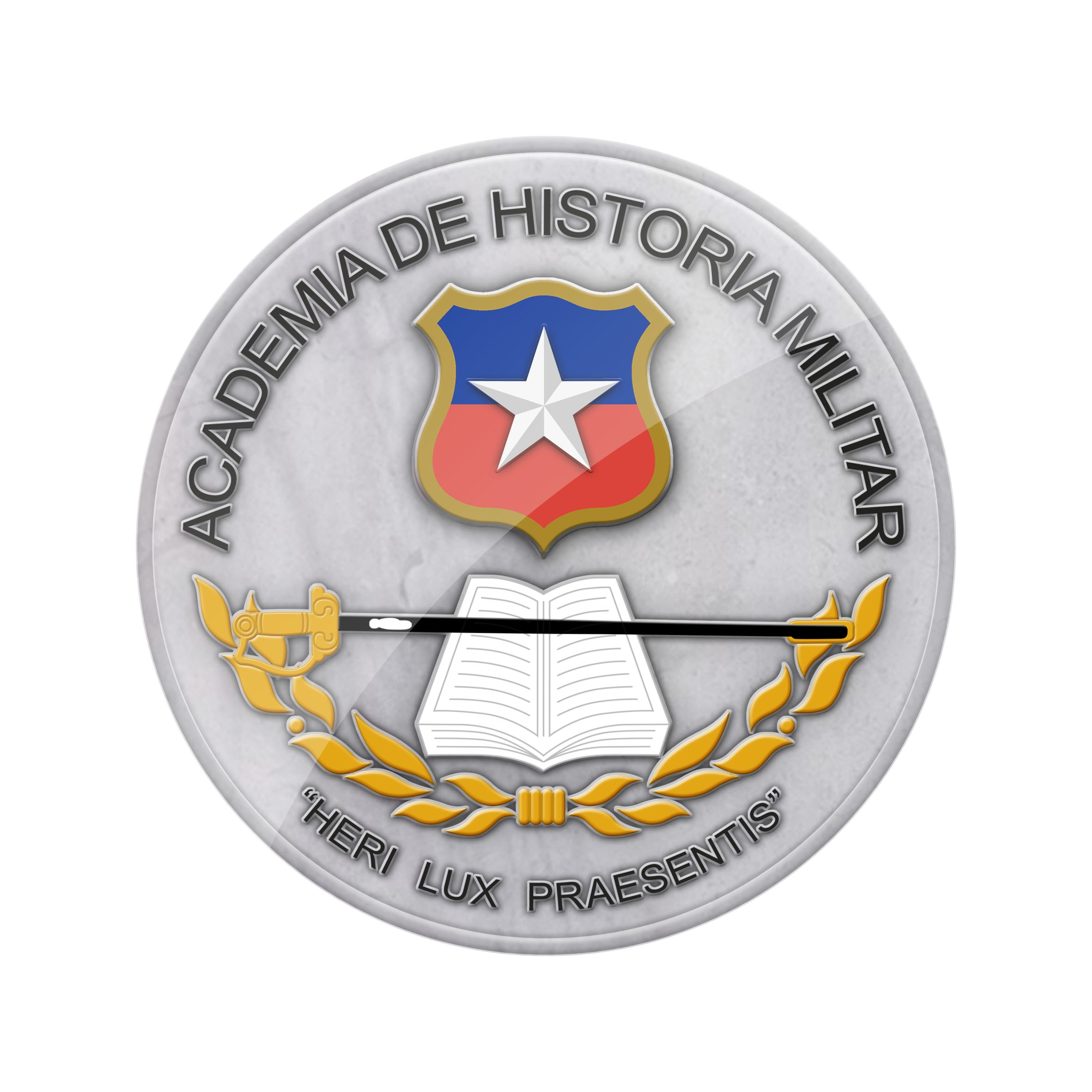 Logo oficial de la Academia de Historia Militar de Chile.